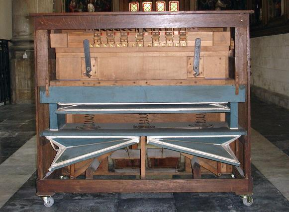 Harmonium